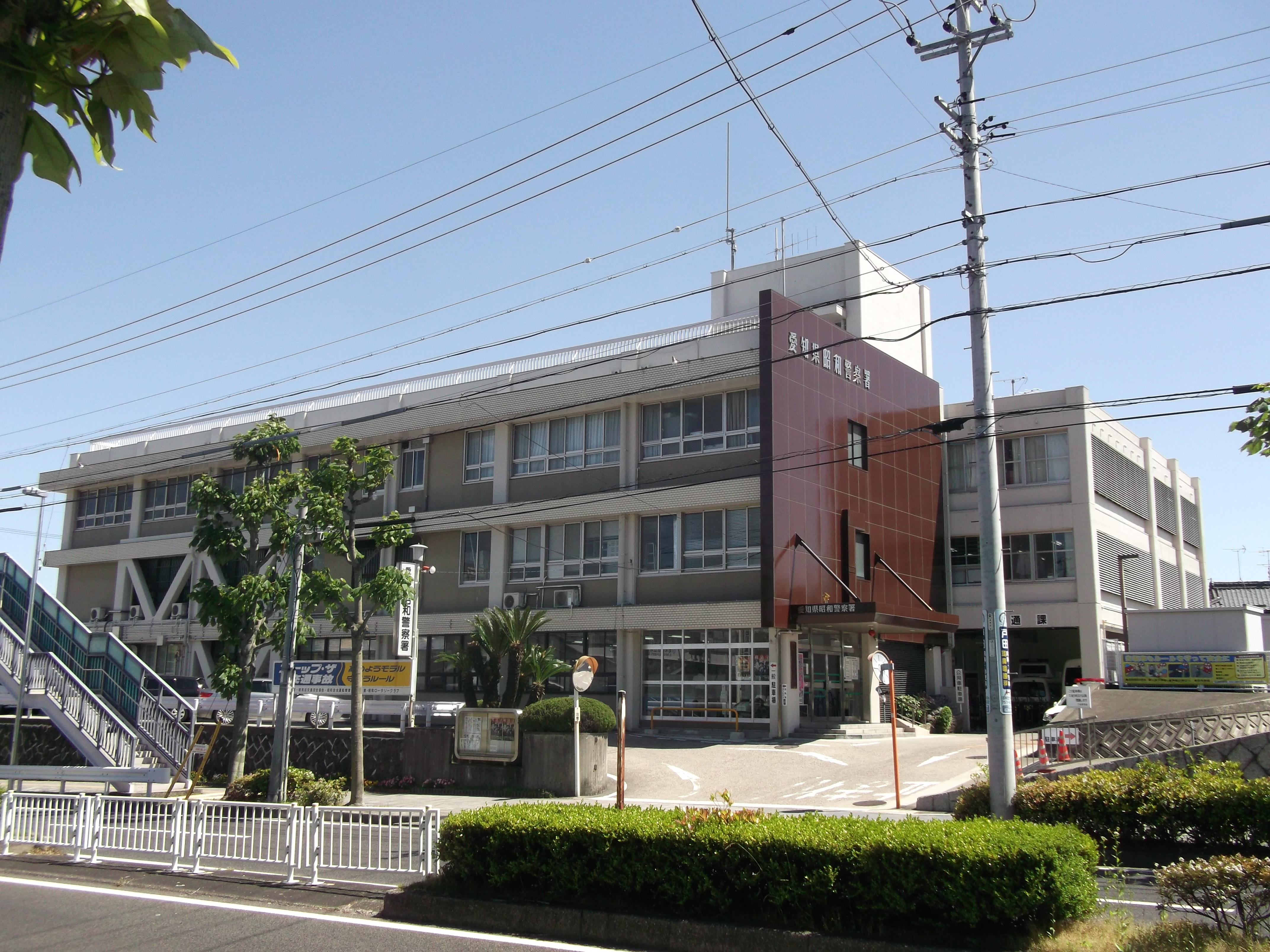 愛知県昭和警察署を北側公道西から写す